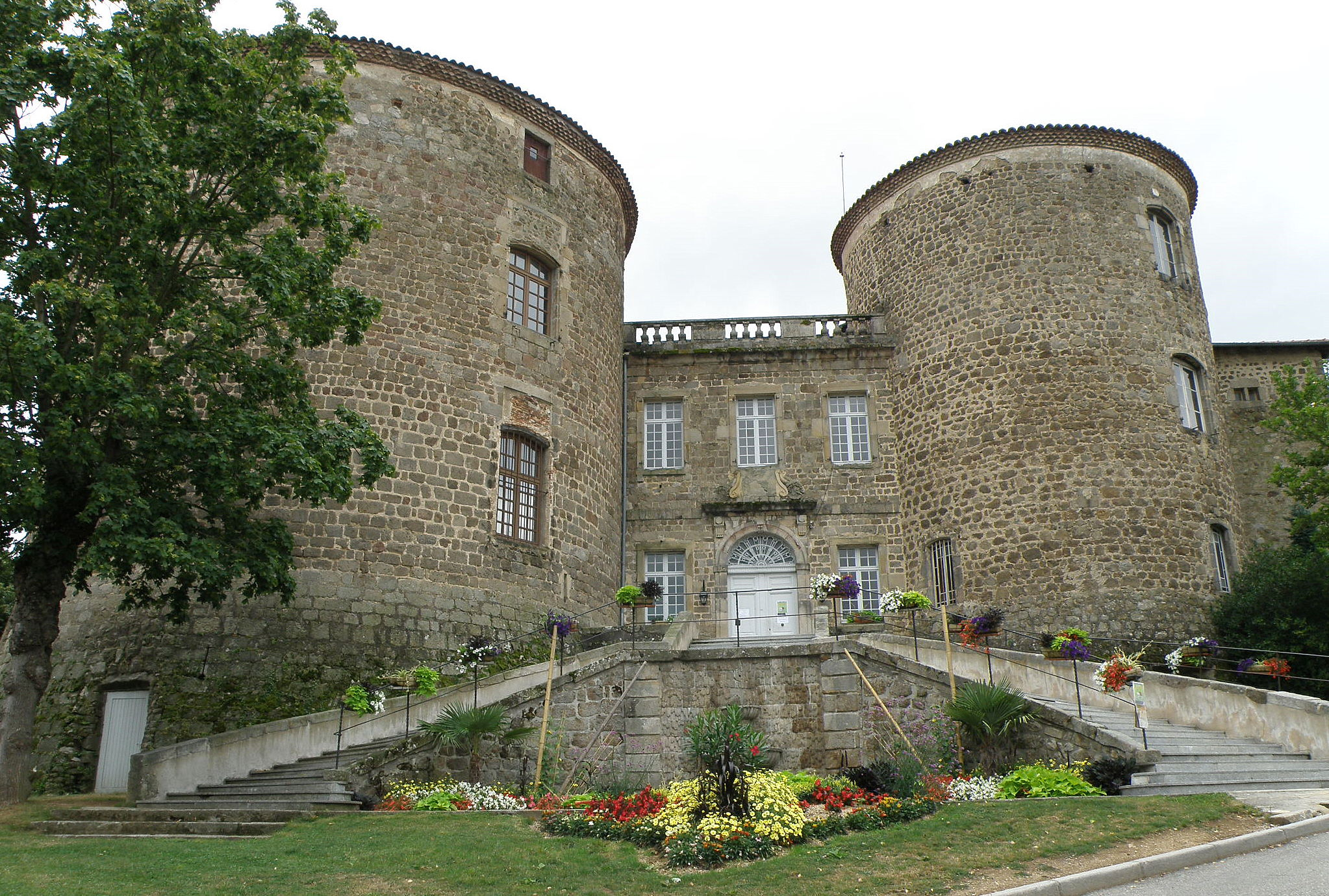 Façade nord-est du château des Évêques-du-Puy à Monistrol-sur-Loire (Haute-Loire, Auvergne, France). .